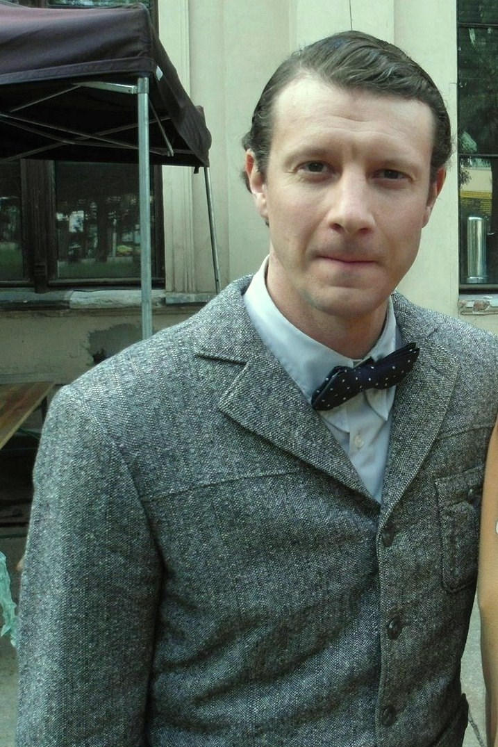 Wojciech Solarz jako Konrad Tom na planie serialu "Bodo".